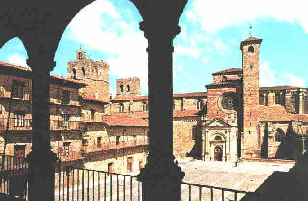 Puerta del Mercado (Sigüenza, Guadalajara)